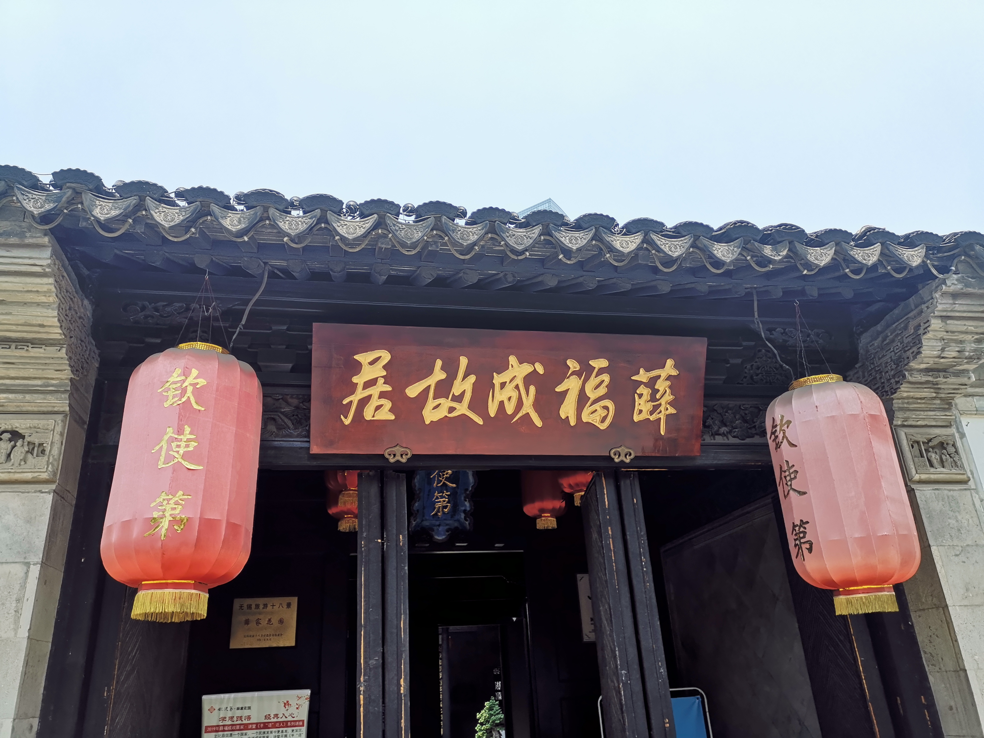 无锡薛福成故居